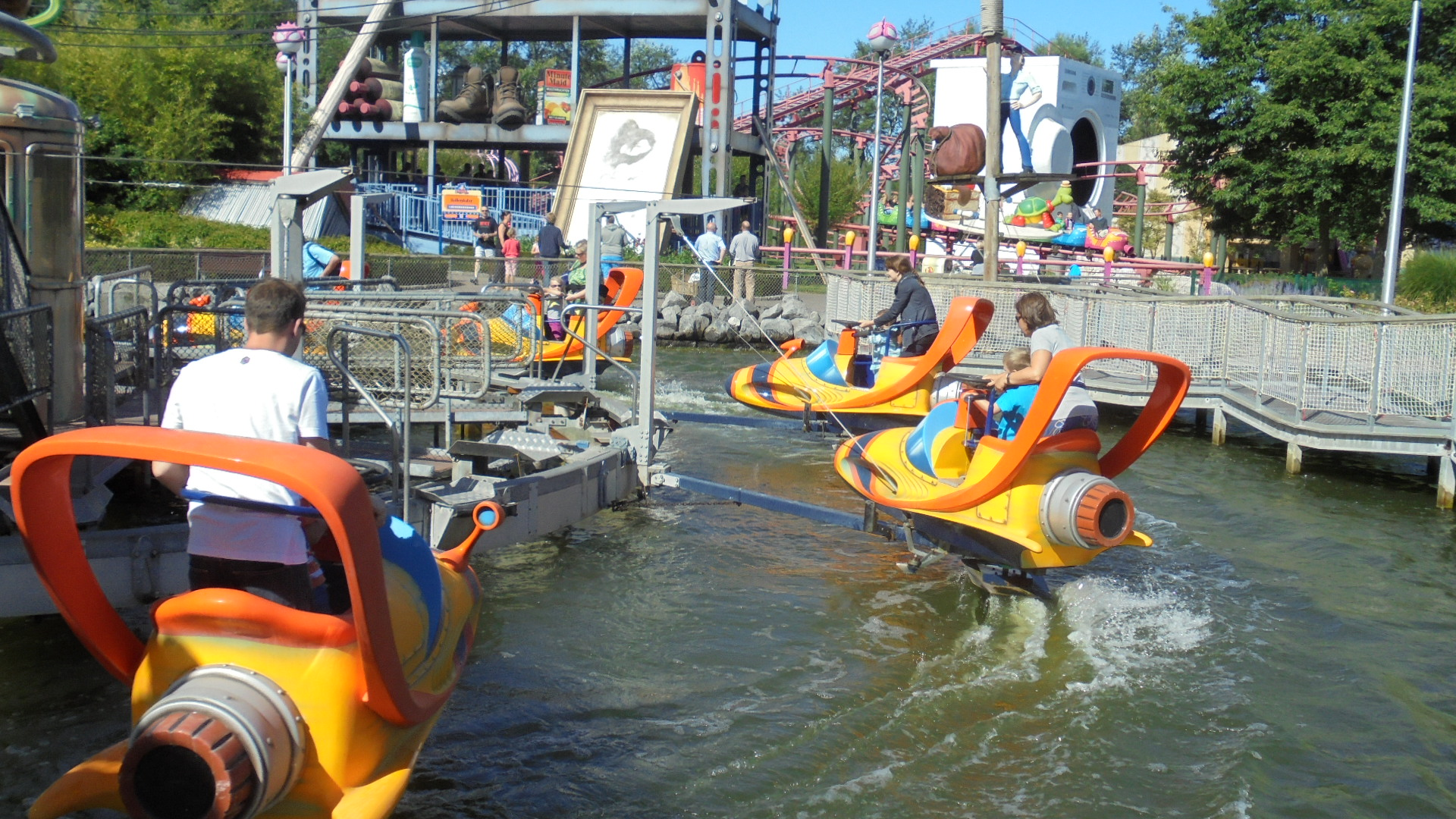 Mega Mindy Jetski